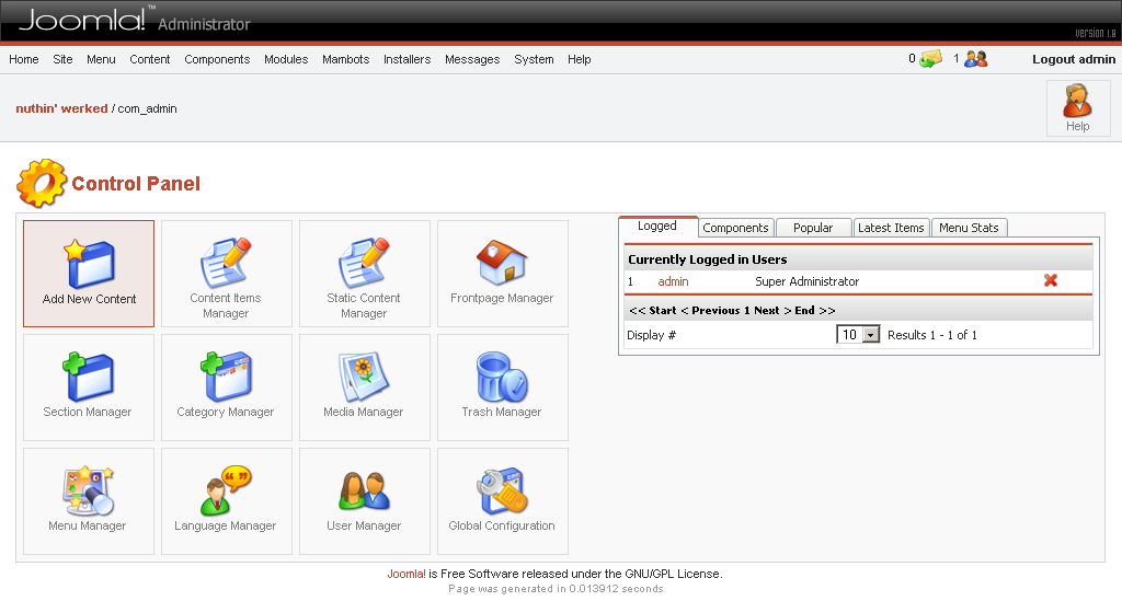 Schermafbeelding van de back-end van Joomla, dat is vrijgegeven onder de